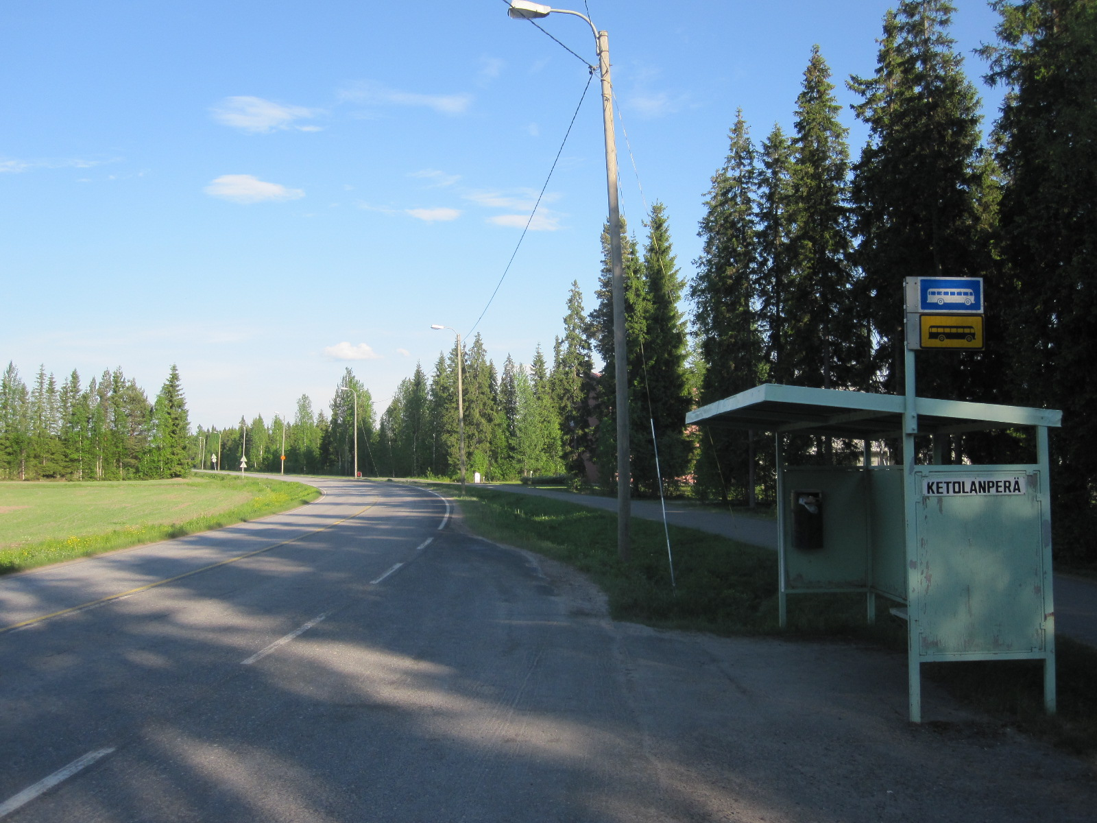 Yhdystie 18637 eli Ketolanperäntie Kempeleen Ketolanperällä Murron suuntaan katsottuna. Kuvassa näkyy myös Ketolanperän linja-autopysäkki, jossa pysähtyvät Koskilinjan ja Kylmäsen Liikenteen linja-autot.